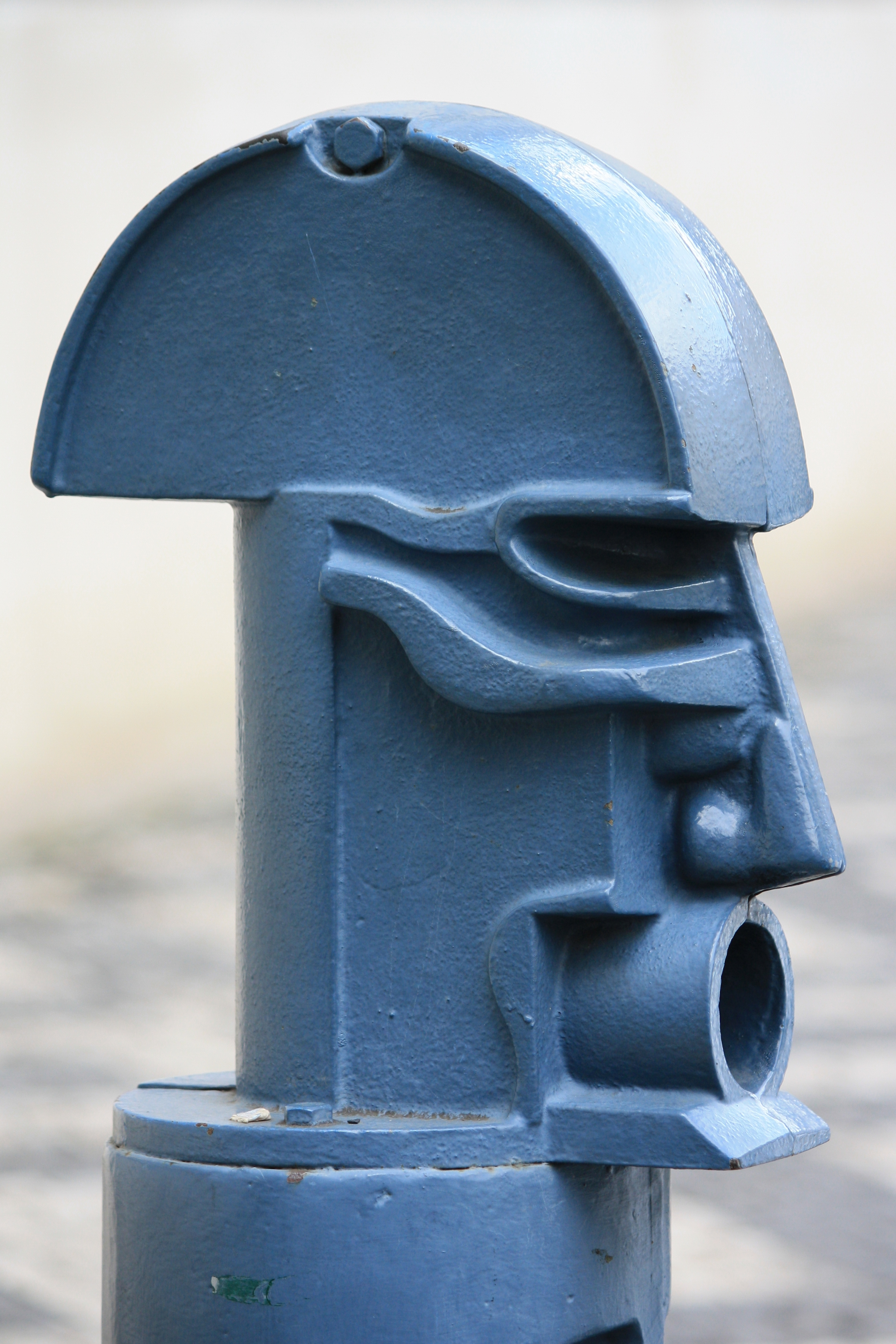 Praha, Malá Strana - jedna z 29 skulptur Karla Nepraše na Malostranském náměstí (27 nižších patníků symbolizuje sedmadvacet českých pánů o jejichž popravě bylo rozhodnuto v Lichtenšteinském paláci, tedy v budově, před kterou jsou umístěny)